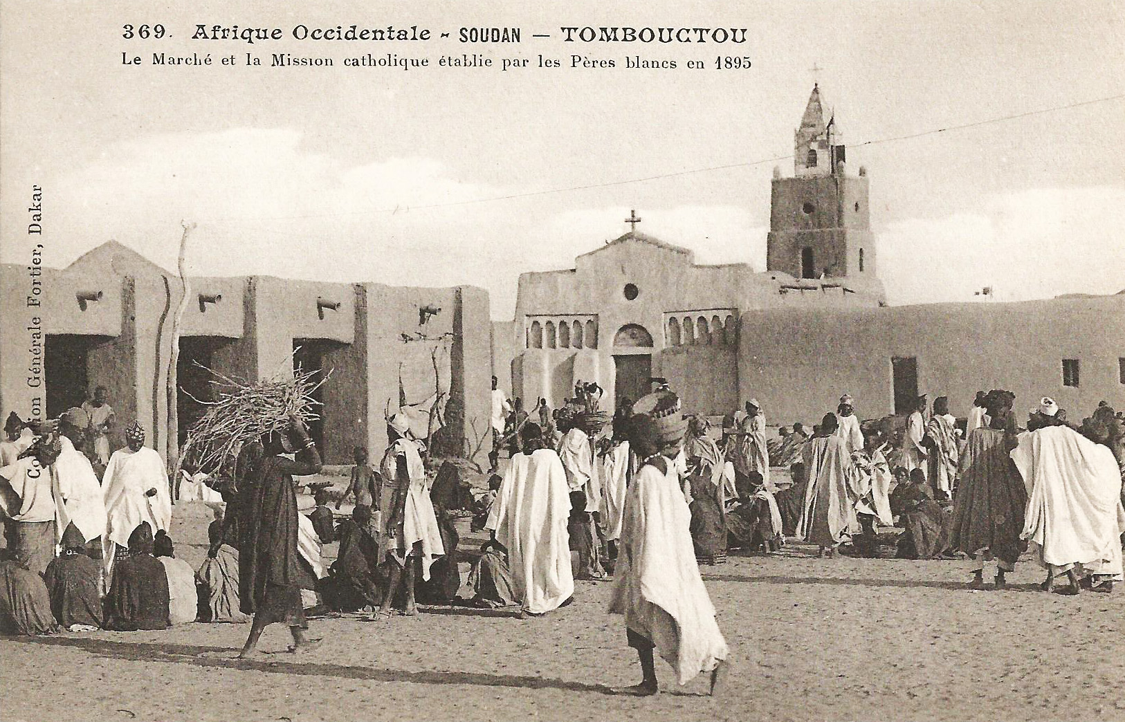 François-Edmond Fortier, Tombouctou. Le Marché et la Mission catholique établie par les Pères blancs en 1895. Afrique Occidentale - Soudan.